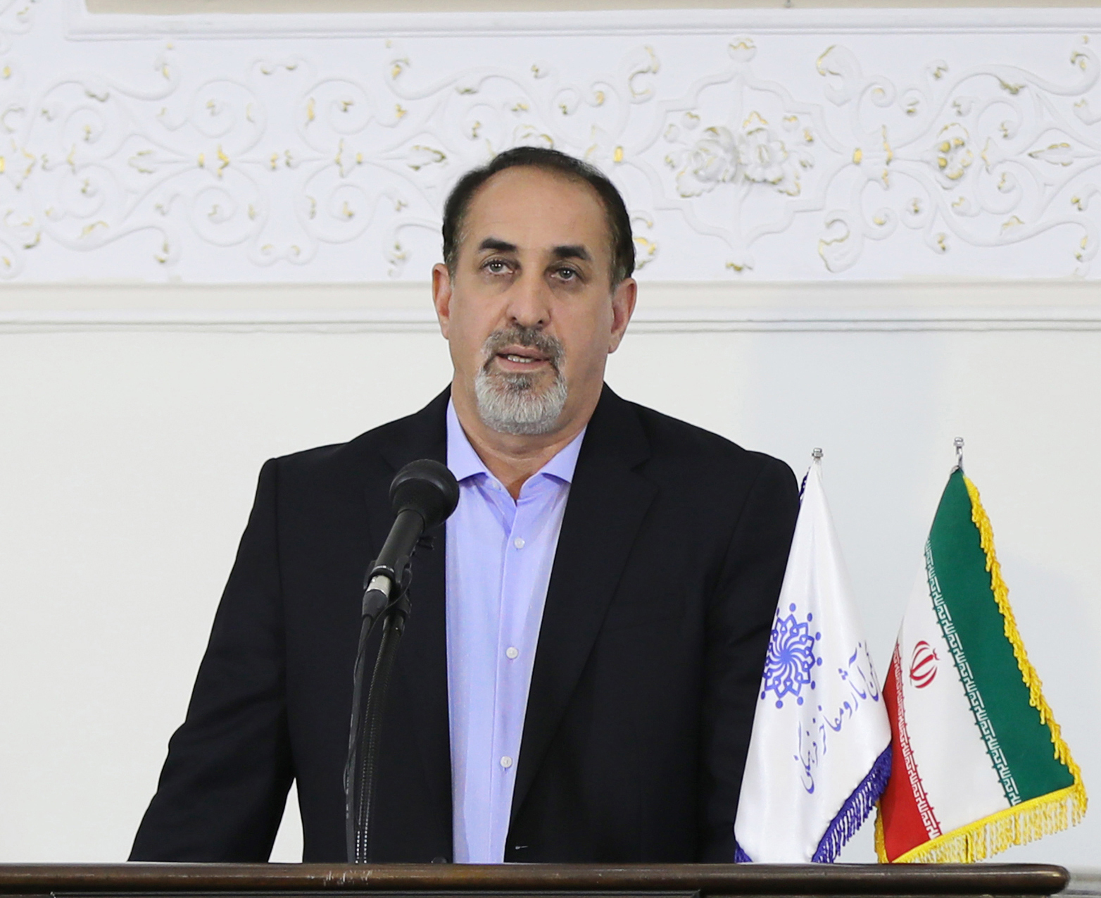 دکتر حسن بلخاری قهی، رئیس انجمن آثار و مفاخر فرهنگی